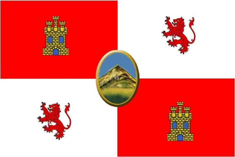 Bandera de la Villa Imperial de Potosí